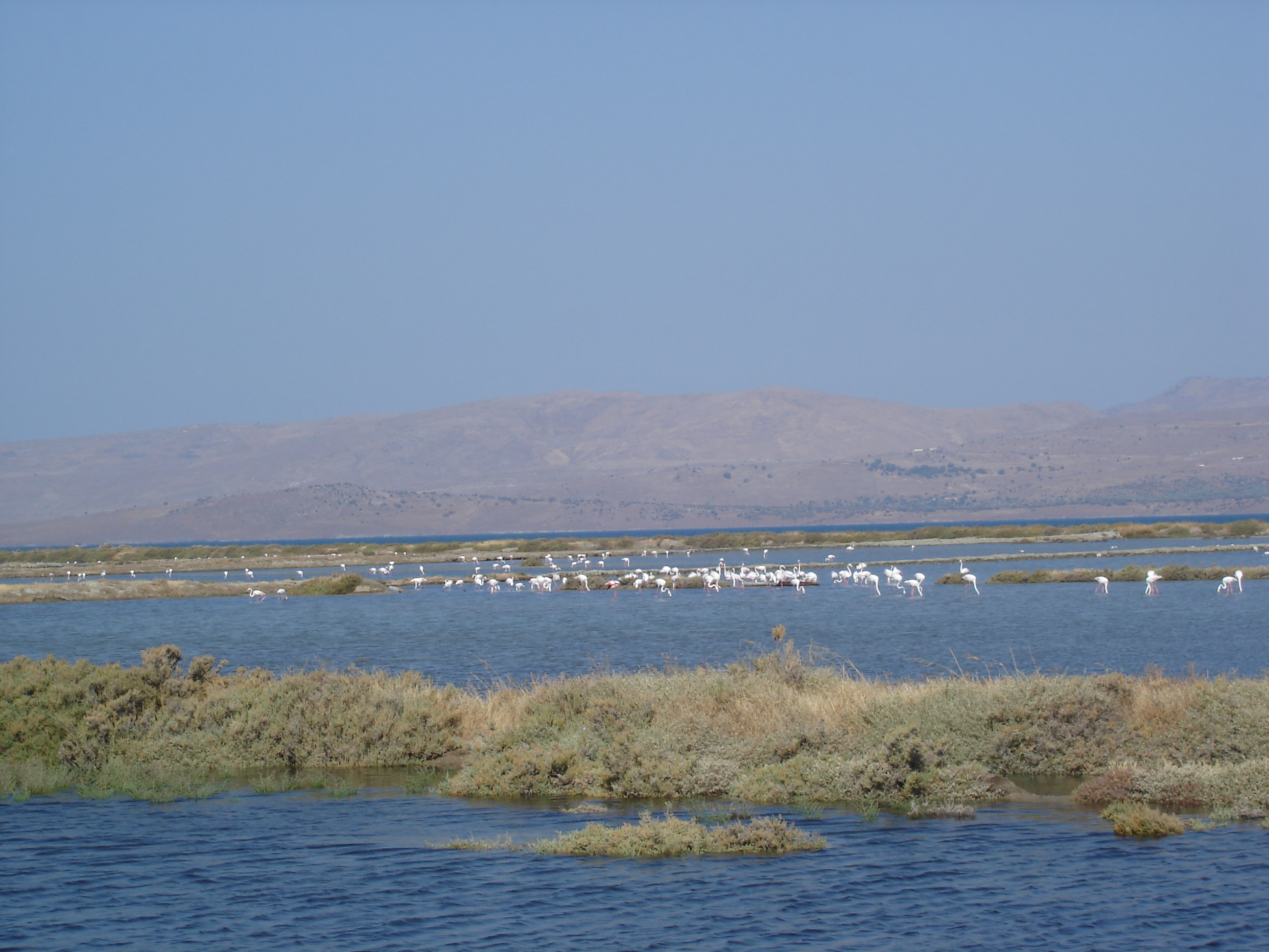 Flamingos op de zoutvlakte